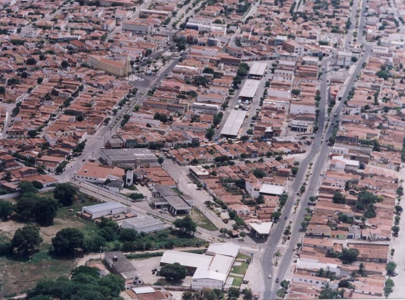 vista aérea de Currais Novos-RN-Brasil, mostrado o centro e adjacências